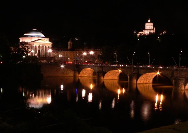 Foto della chiesa della Gran Madre di Dio a Torino - Italy